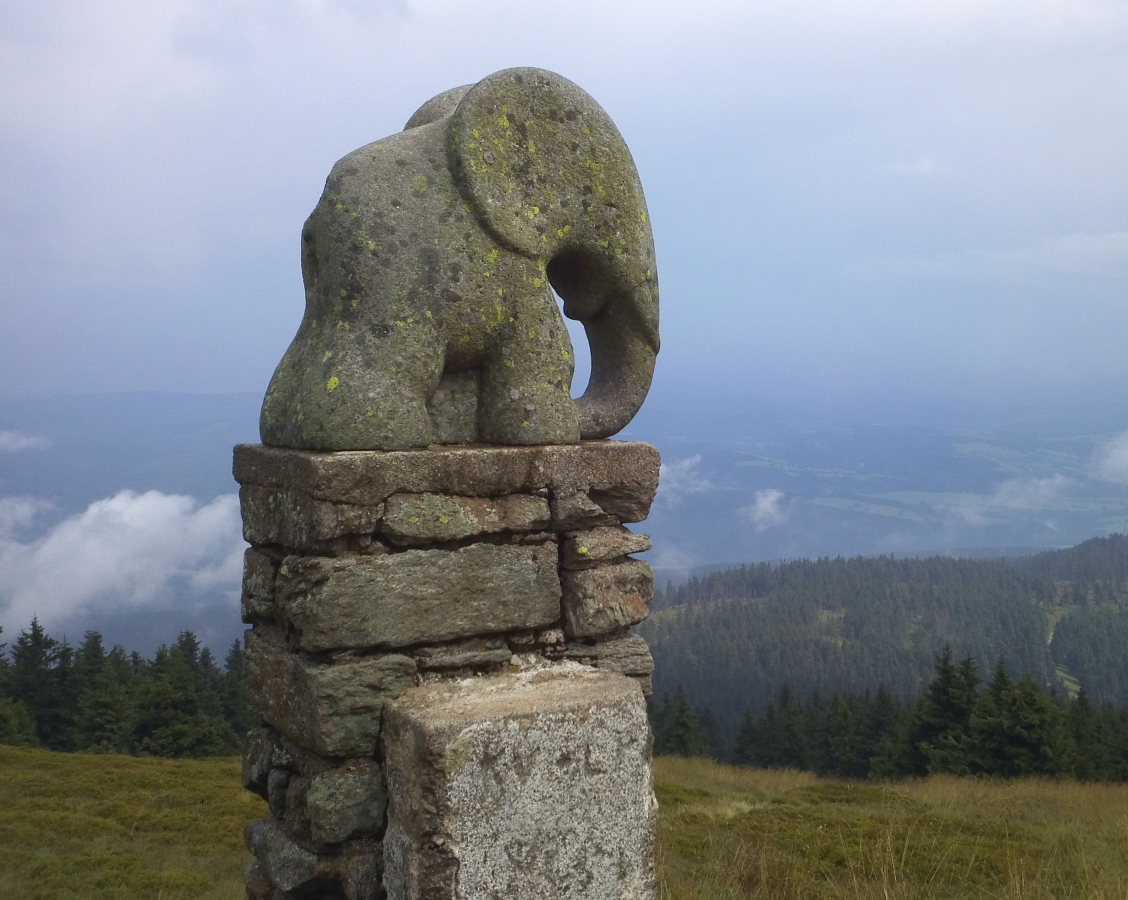 Soška slůněte z roku 1932 u bývalé Liechtensteinovy boudy pod Králickým Sněžníkem.